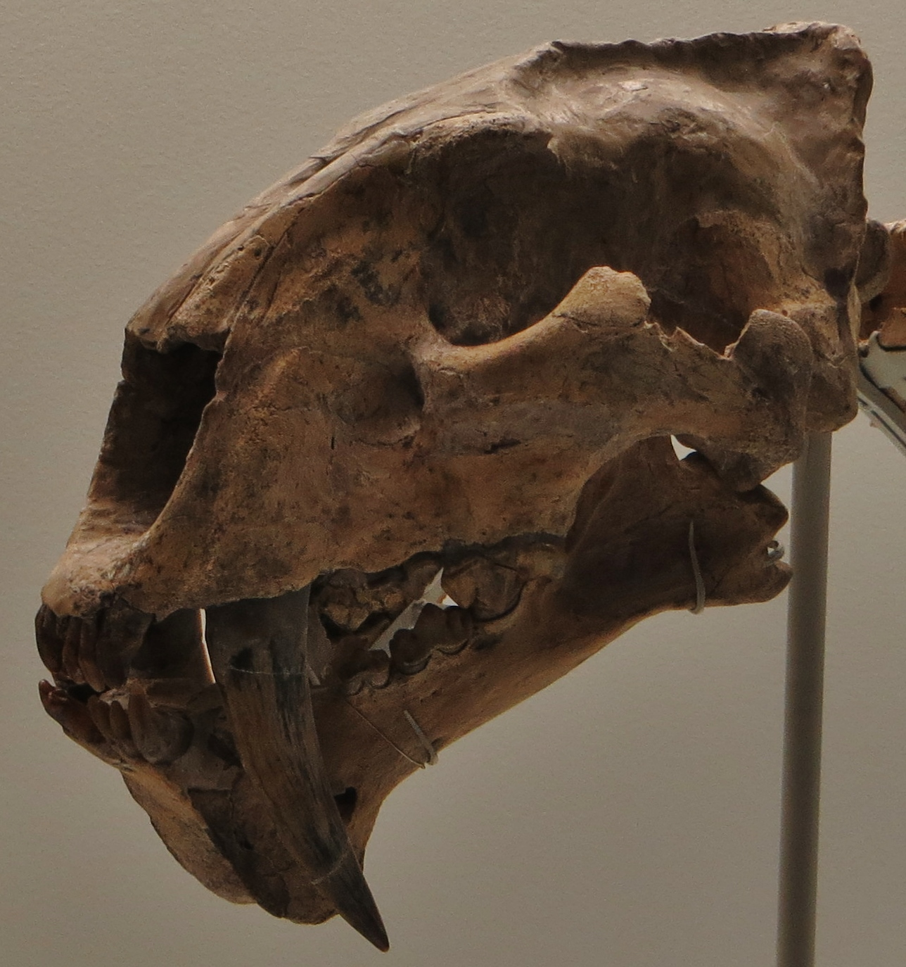 Fossil of Megantereon- Took the picture at Natural History Museum, Basel